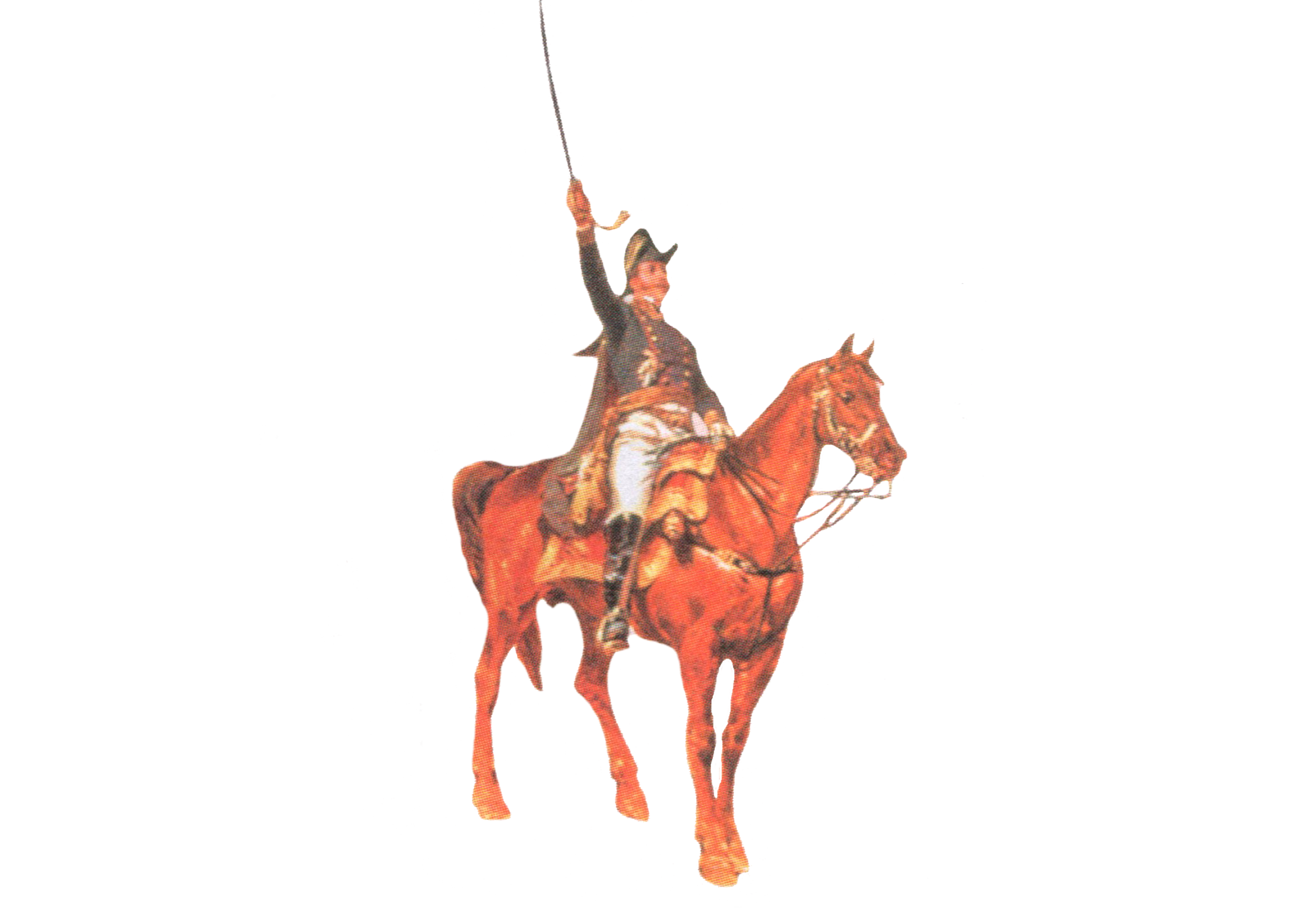 Recorte do imperador Dom Pedro I do Brasil na pintura de Pedro Américo, de 1888, que retrata o ato do Grito do Ipiranga na Independência do Brasil.